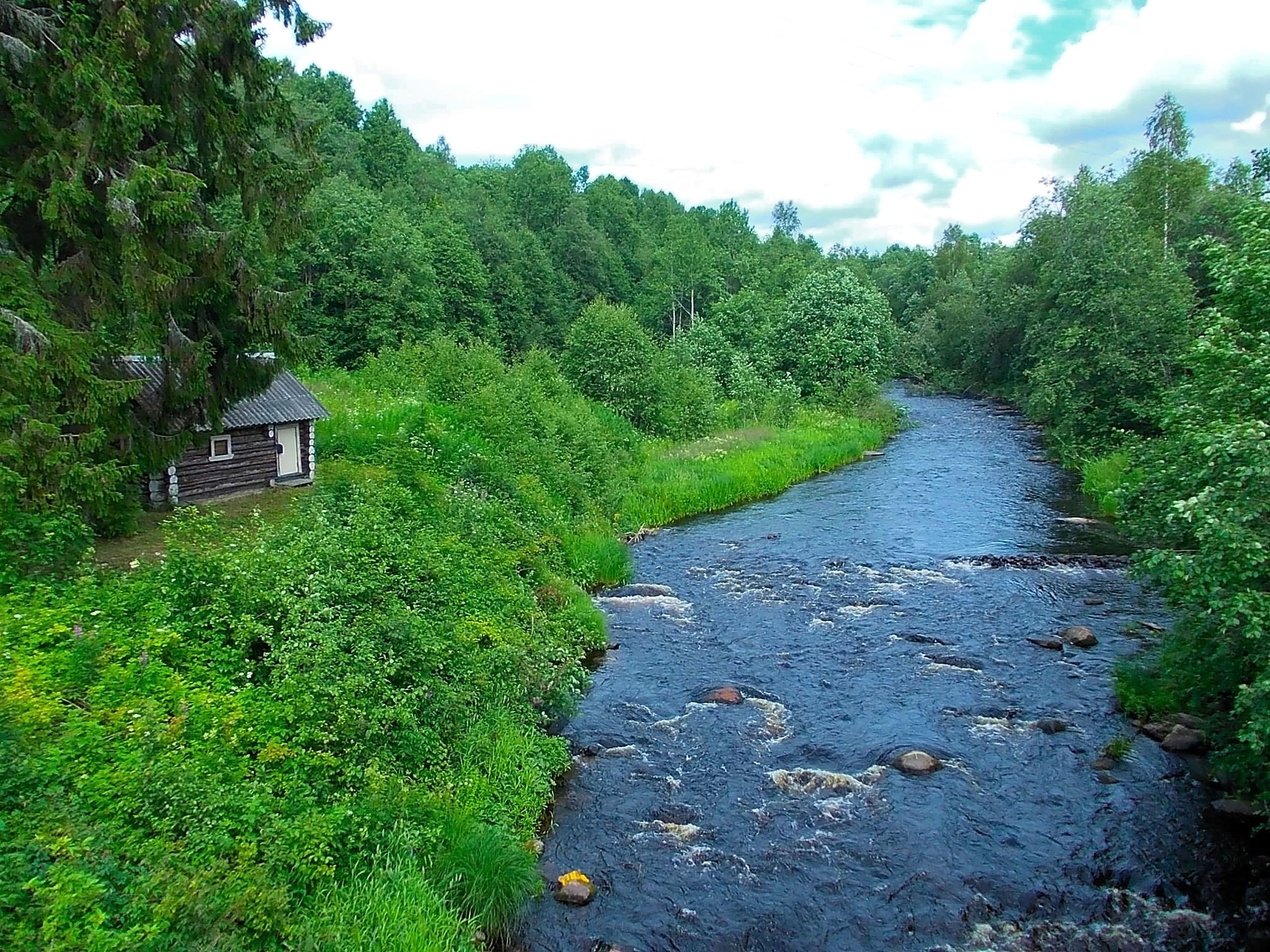 Река Усланка недалеко от устья